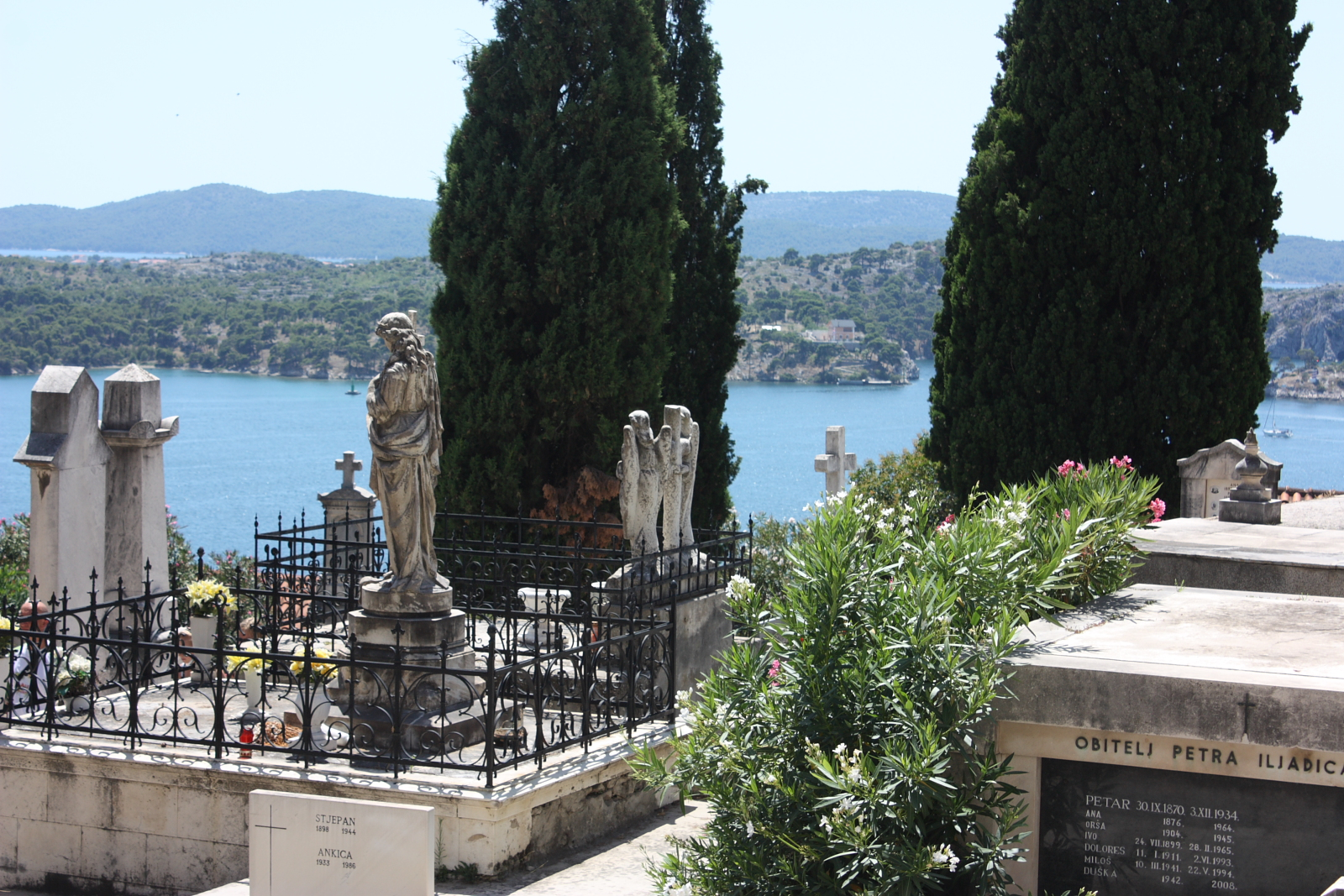 Sibenik